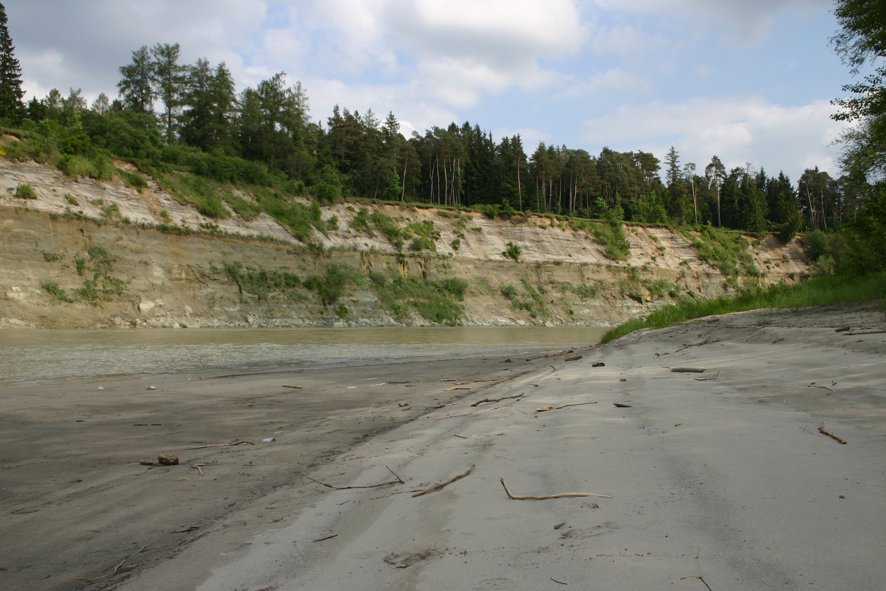 Das Bild zeigt den Inn in der Gemeinde Waldkraiburg und am gegenüberliegenden Ostufer den Prallhang des Inns bei Heisting (Geotop-Nr. 183R010) in der Gemeinde Polling in der Nähe von Mühldorf am Inn; Fluss-Km 113,4.